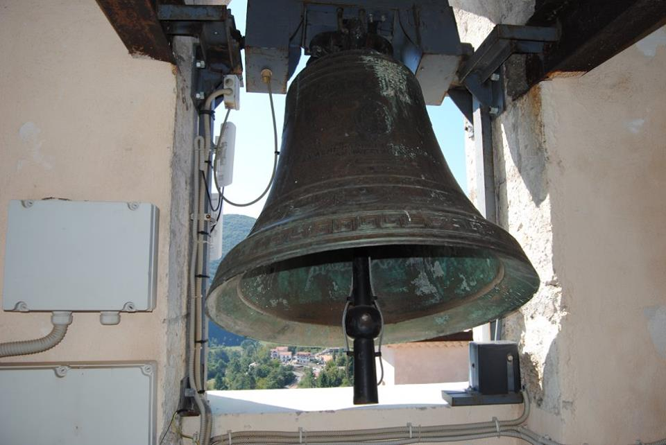 chiesa parrocchiale di Acquafondata (Fr)